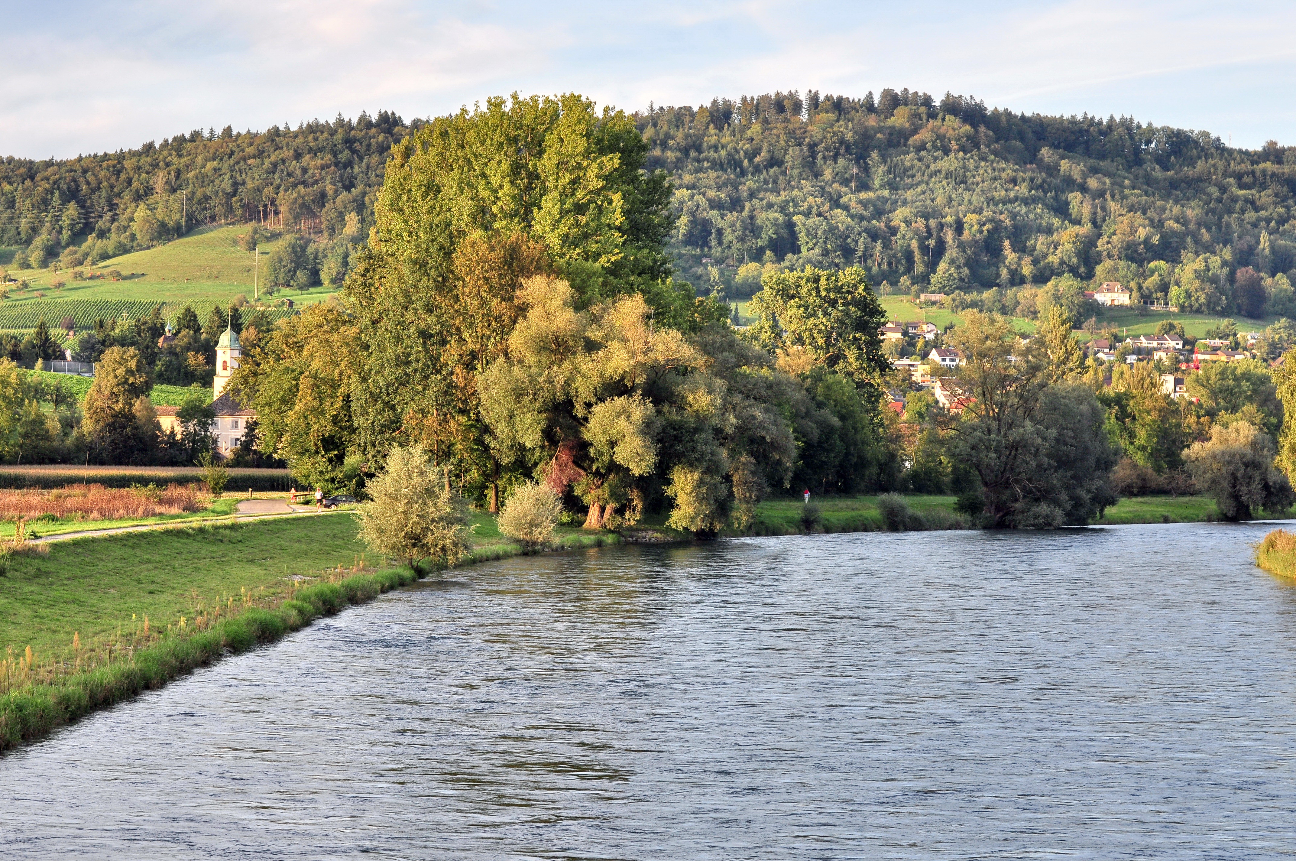 Kloster Fahr in Würenlos (Switzerland), Limmat river to the right, Unterengstringen with Gubrist in the background.